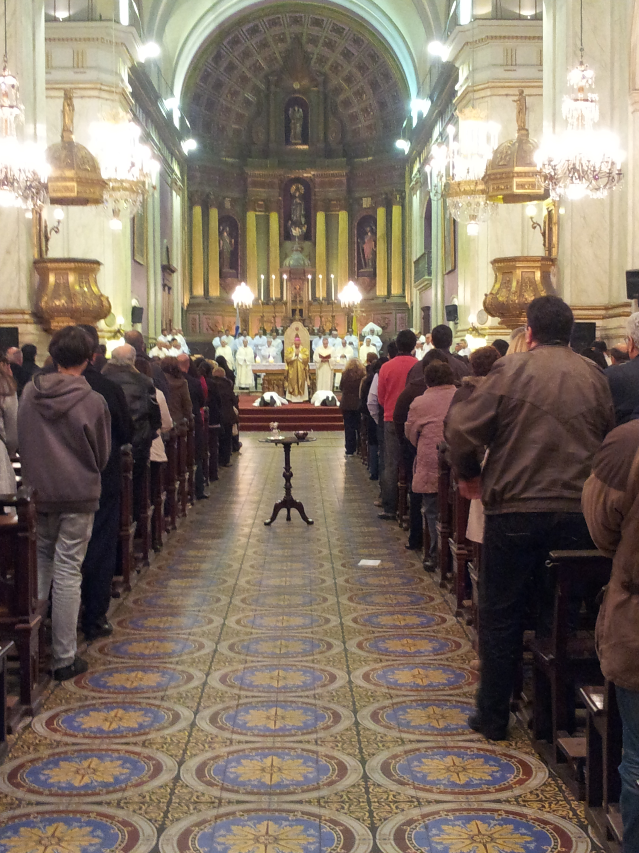 Ordenación sacerdotal en la Catedral de Montevideo.